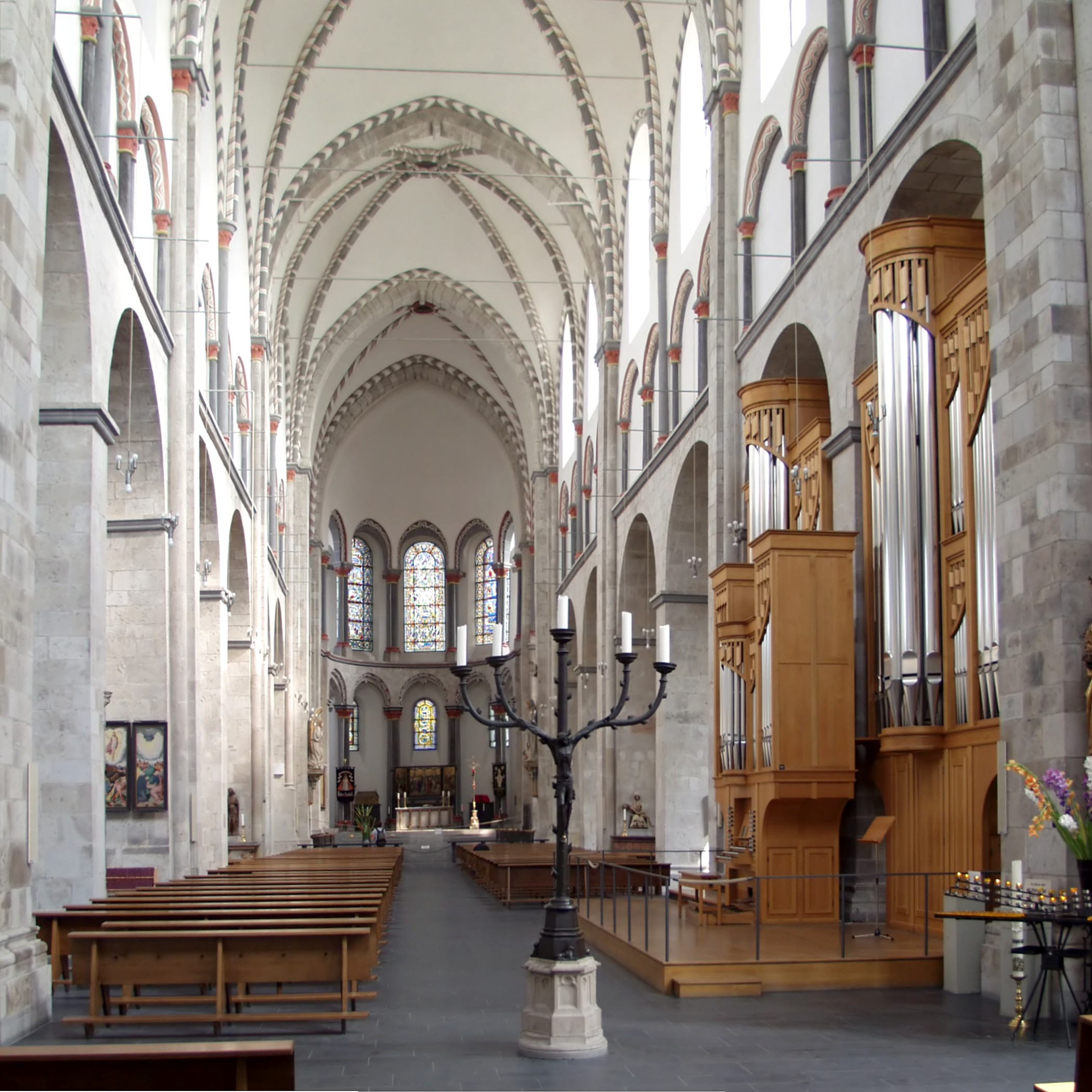 St. Kunibert (Köln), Langhaus Richtung Osten.